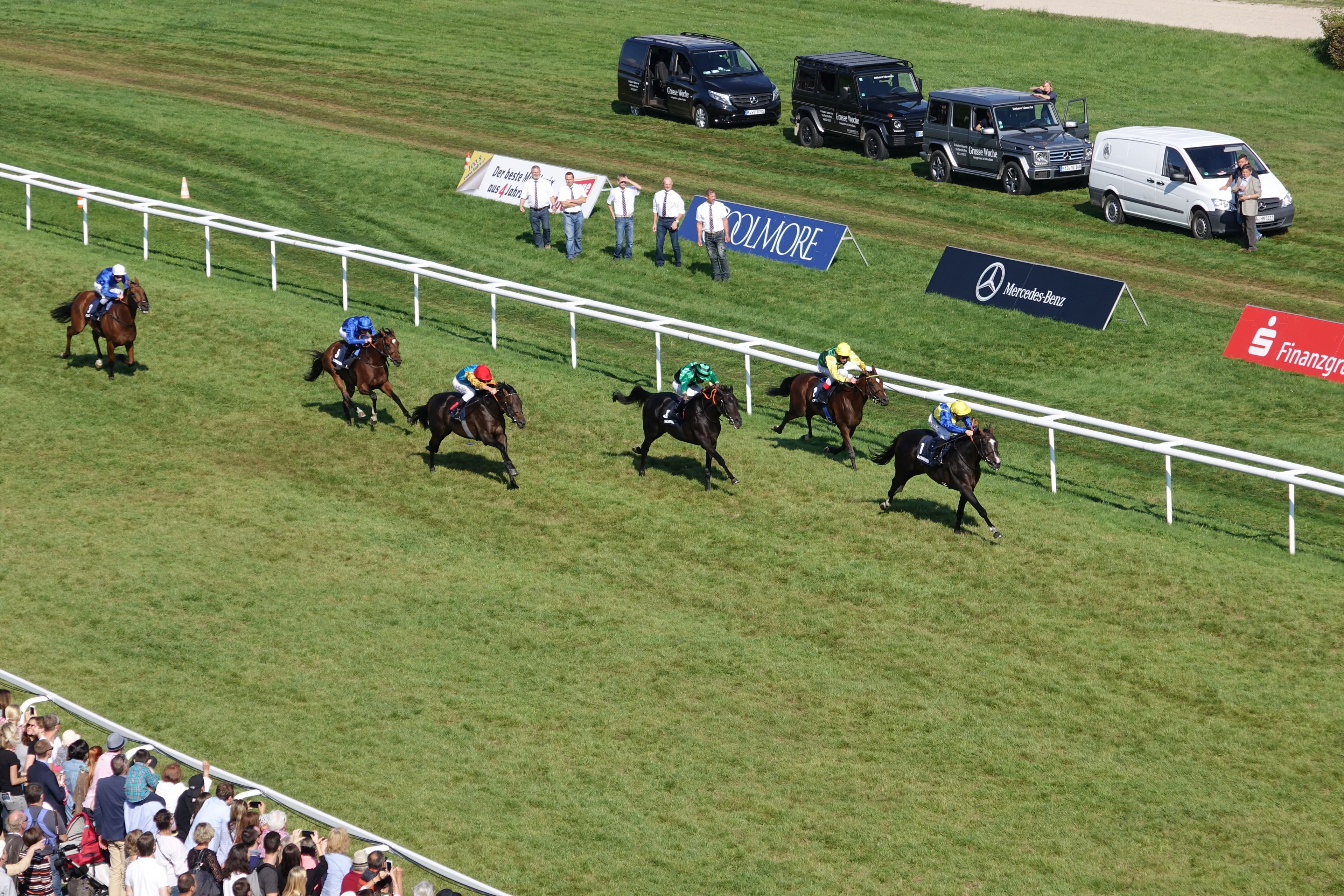 Zieleinlauf des Großen Preis von Baden 2017: Guignol vor Iquitos, Colomano und Windstoß